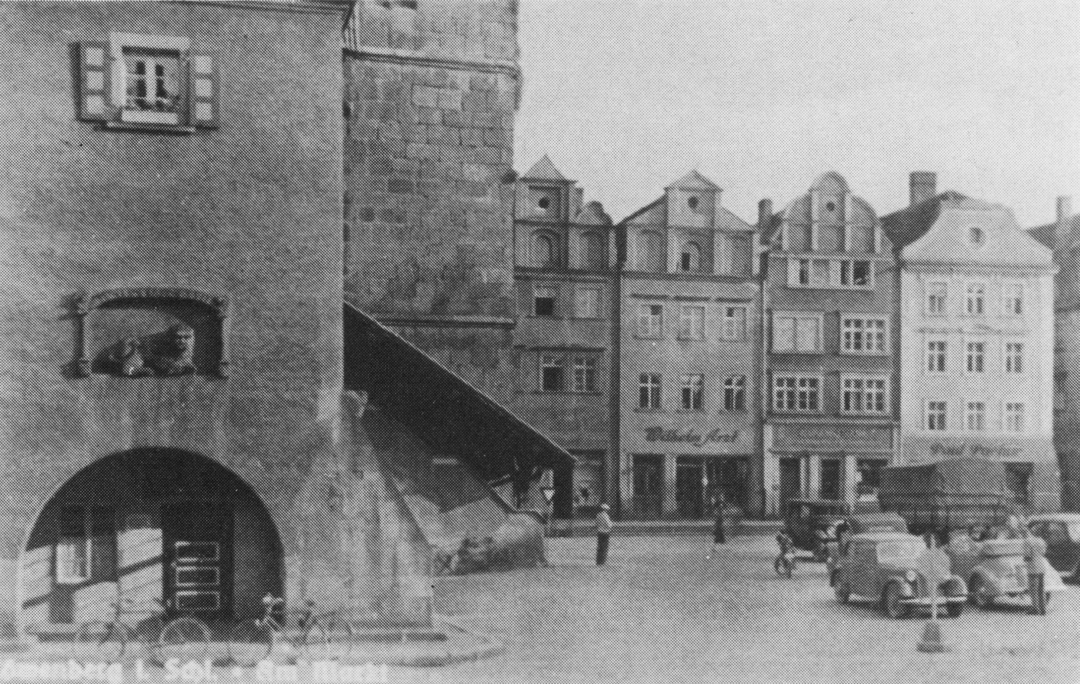 Kürschnermeister F. J. A. Arzt, Löwenberg in Schlesien (heute Lwówek Śląski, Polen). „Wilhelm Arzt“, Stammhaus der Firma Pelzhaus Arzt, Karlsruhe, gegründet 1859.